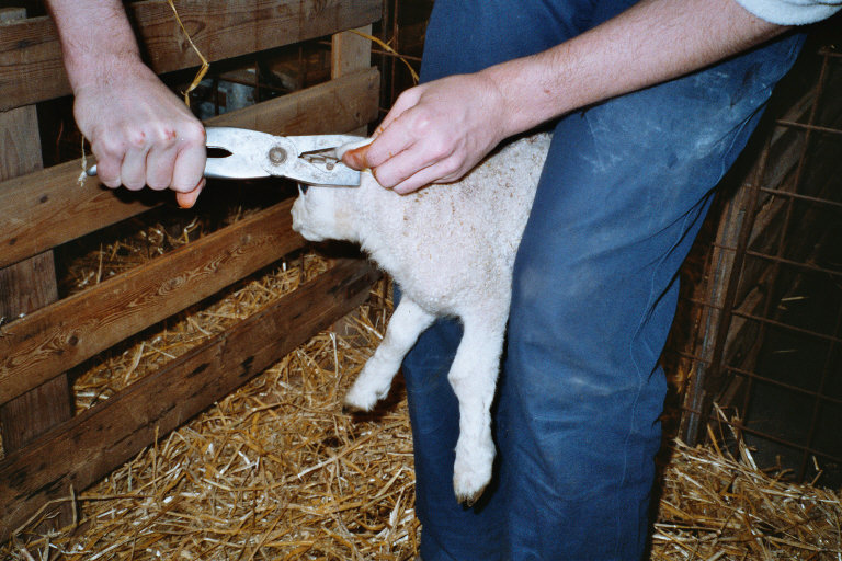 Anbringen einer Ohrmarke, eigene Fotografie, Februar 2005